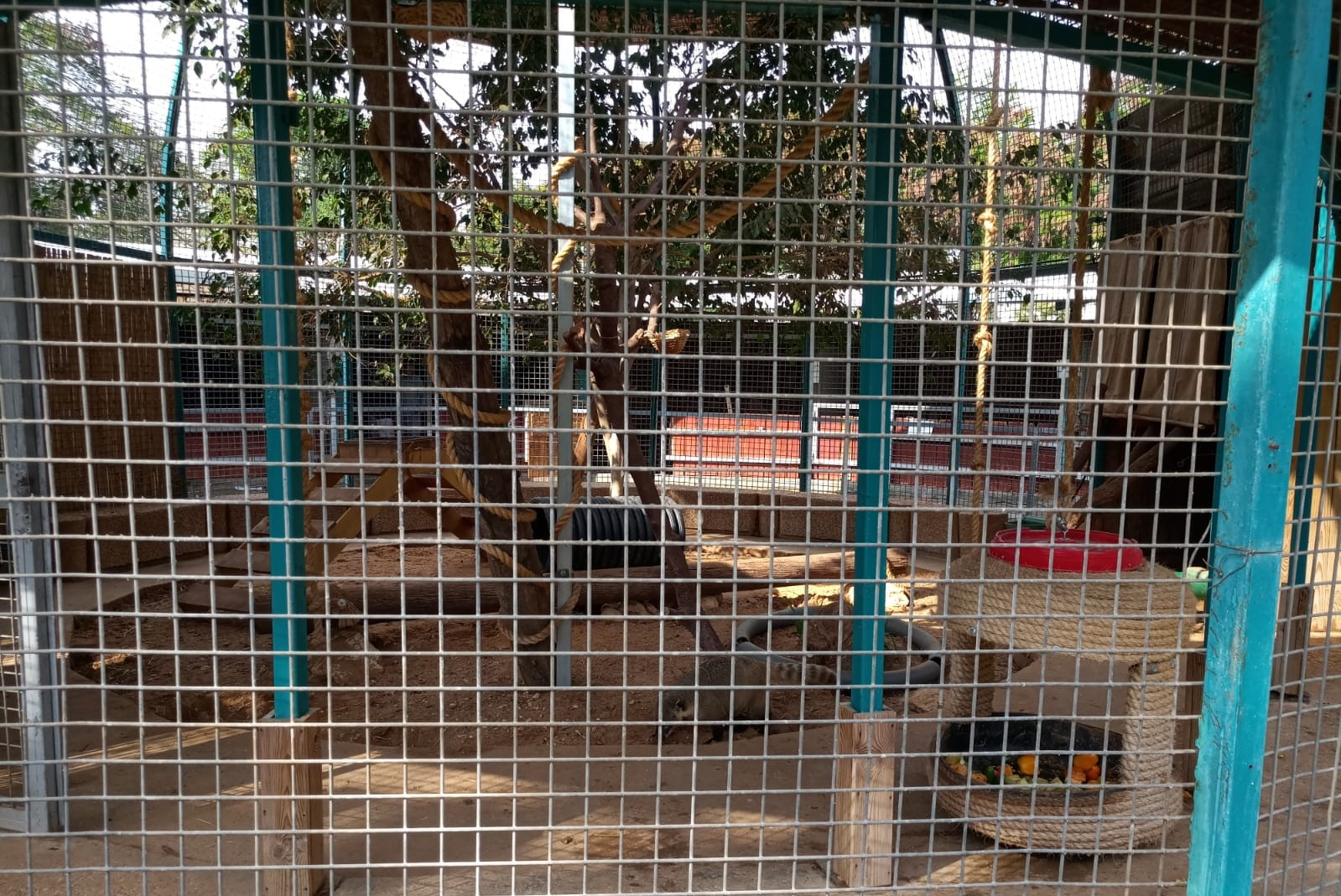 גן החי